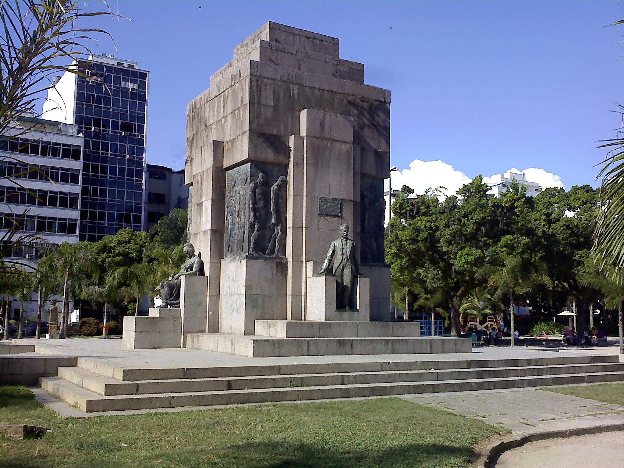 Monumento ao Senador Pinheiro Machado, inaugurado em 1931 - localizado no bairro de Ipenema, cidade do Rio de Janeiro - Brasil